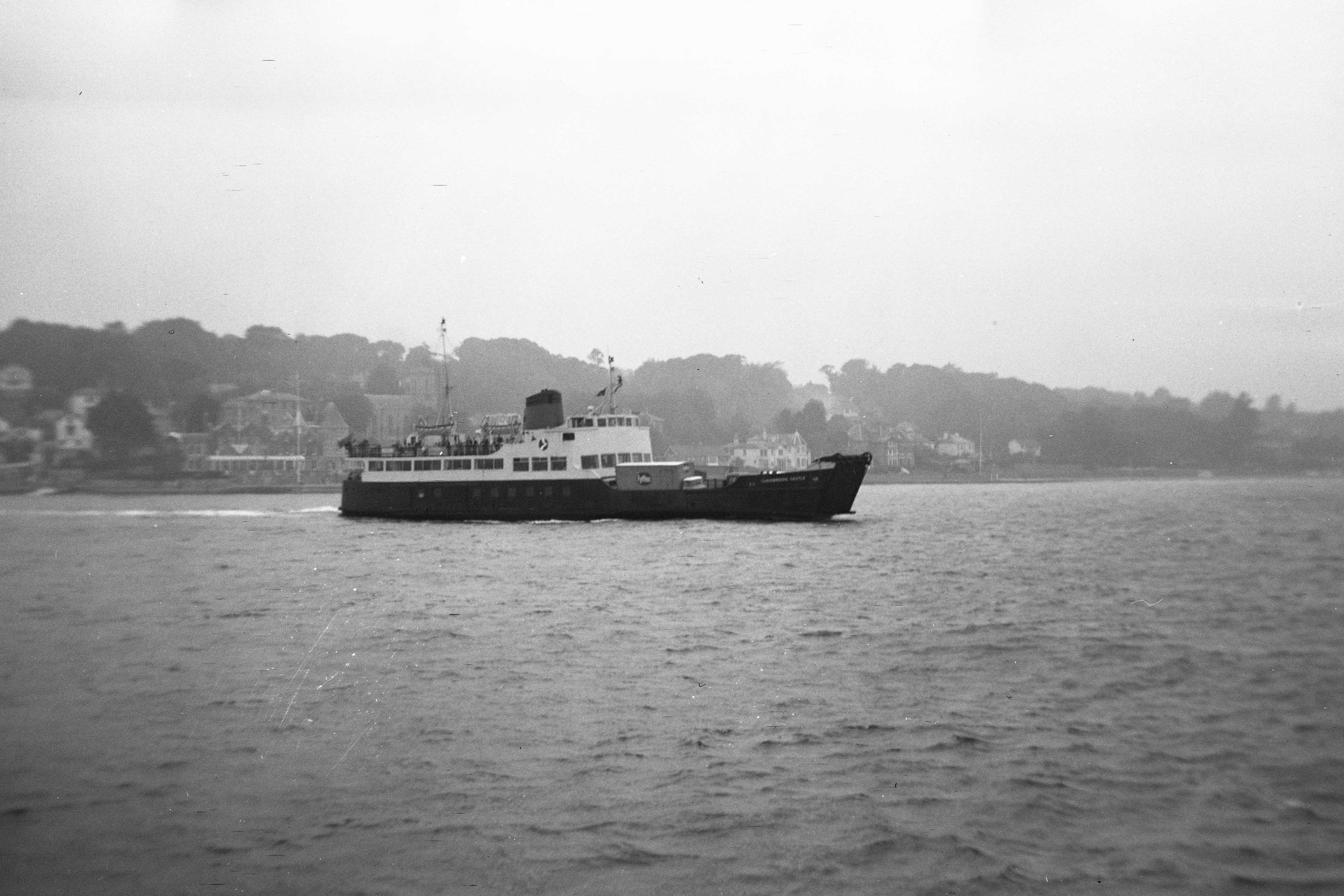 Coronet Clipper 120 roll film camera, scan from negative.